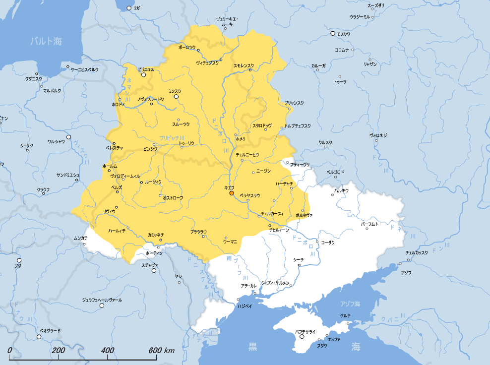 Мала Русь (Малоросія) у